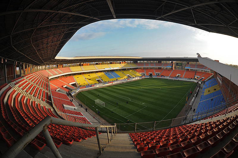 Cтадион Юбилейный 2008год